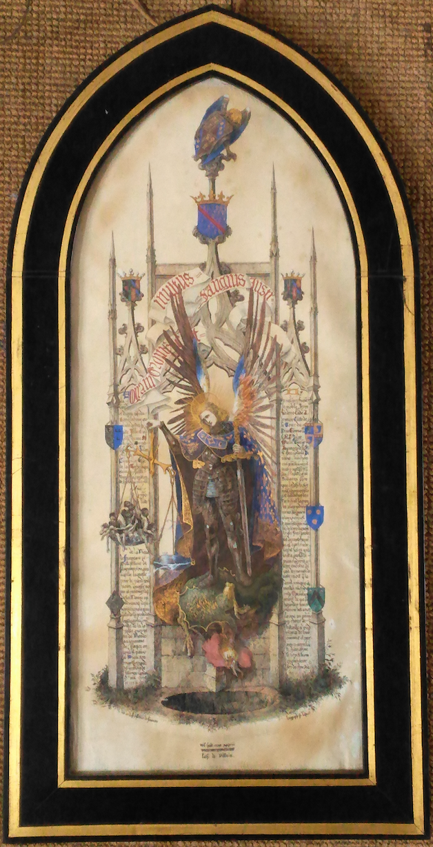 Félicie de Fauveau : Saint Michel terrassant le dragon à tête de coq, projet de monument à Louis Charles de Bonnechose (1833), lithographié par Pierre-Alexandre Lapret